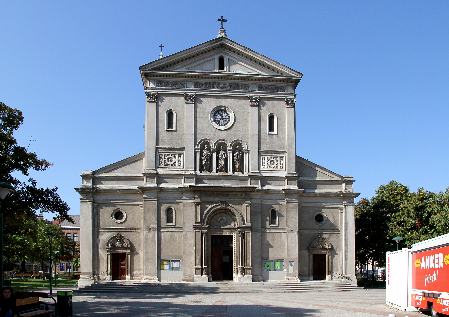 Die katholische Pfarrkirche hl. Johann Evangelist am Keplerplatz in Wien.